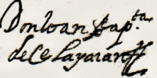 Copia de la firma de Juan Bauptista de Çelayarán